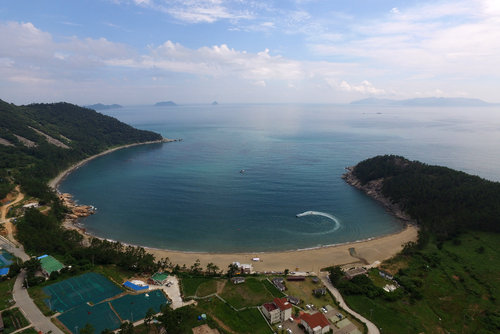 전라남도 완도군의 생일도에 위치한 금곡해수욕장으로 고운모래해변이 특징이다.